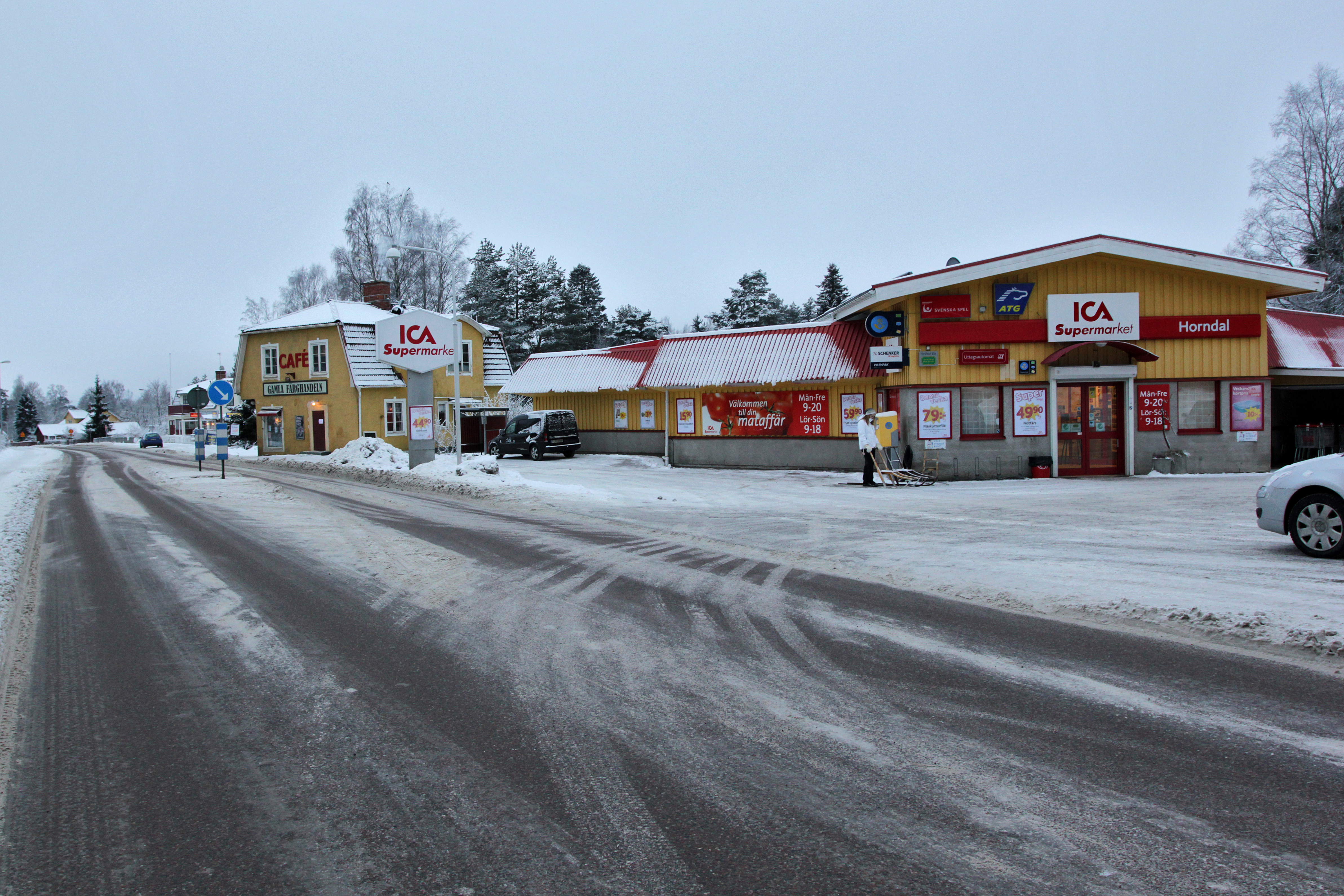 Villahed (Centrum), Horndal, Sverige.